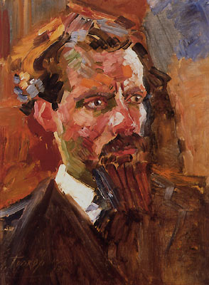 Portret van Lambert Lourijsen (1911) door Jan Toorop